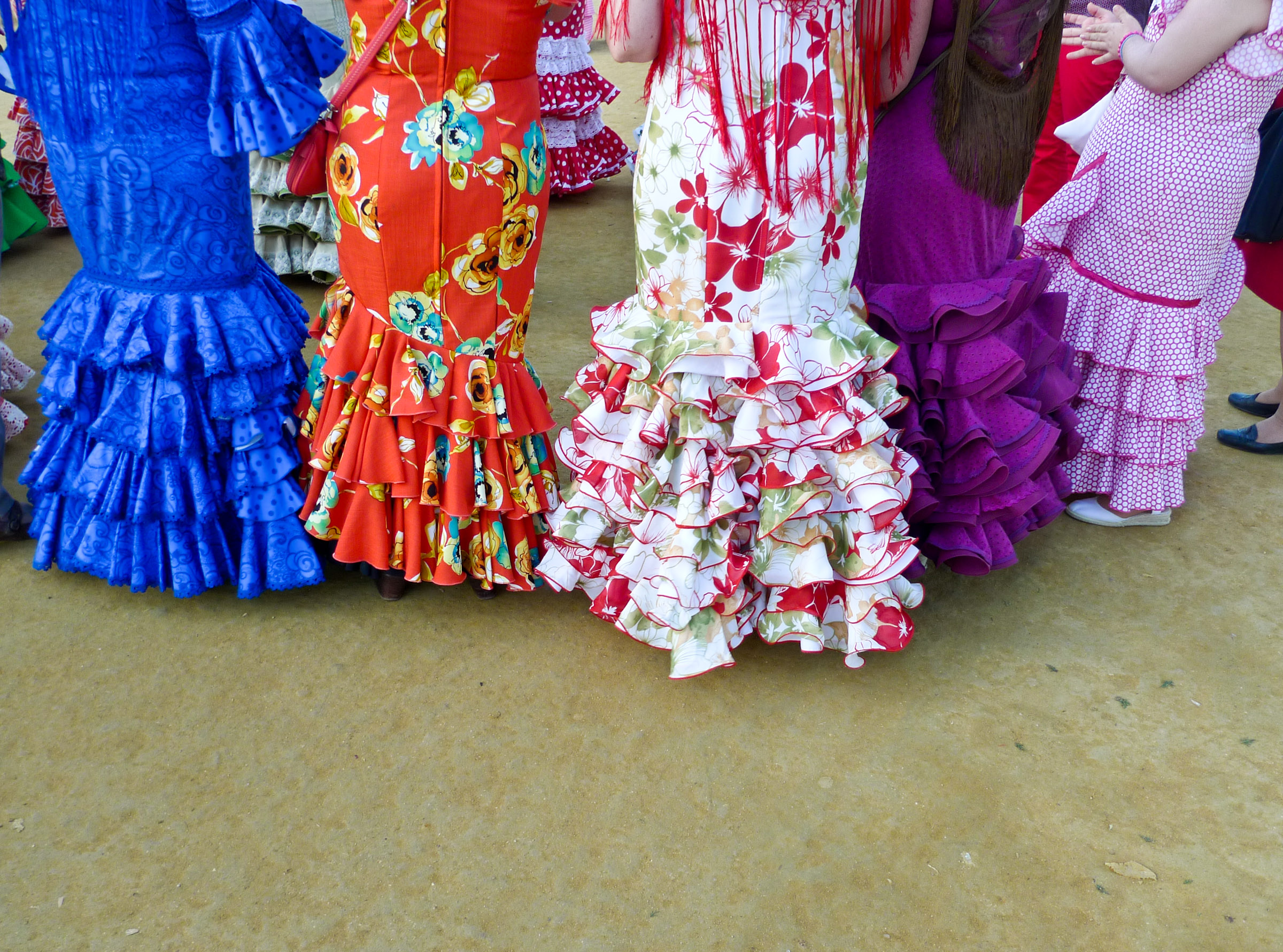 Feria de Abril de Sevilla